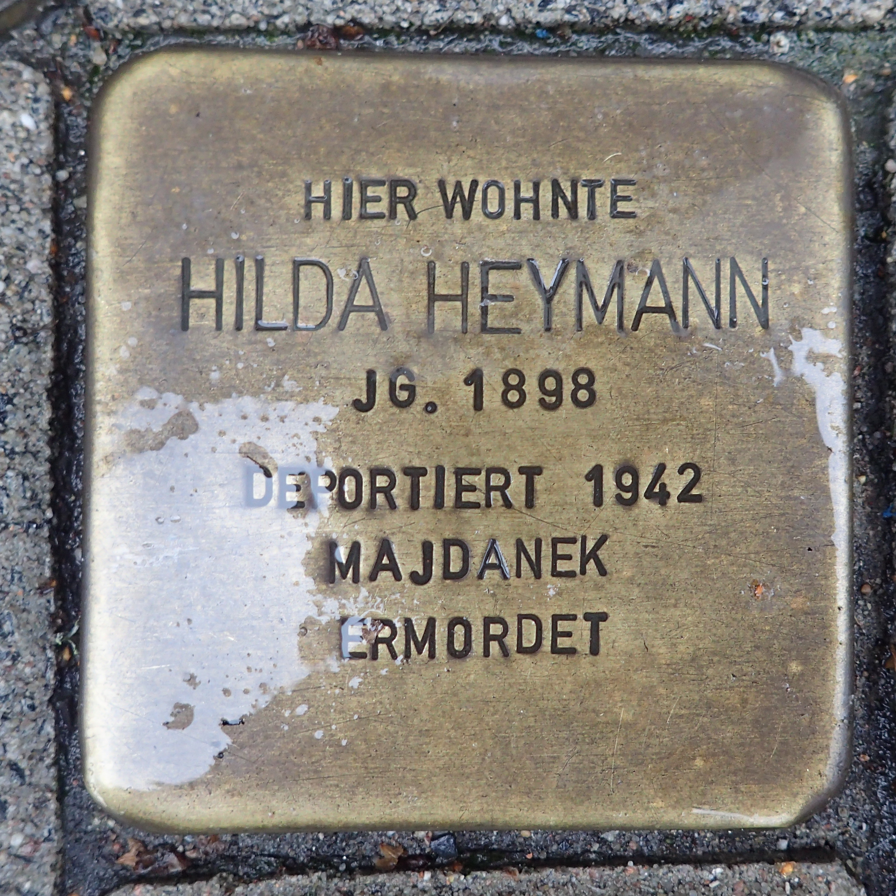 Stolperstein Geldern Nordwall 49 Hilda Heymann